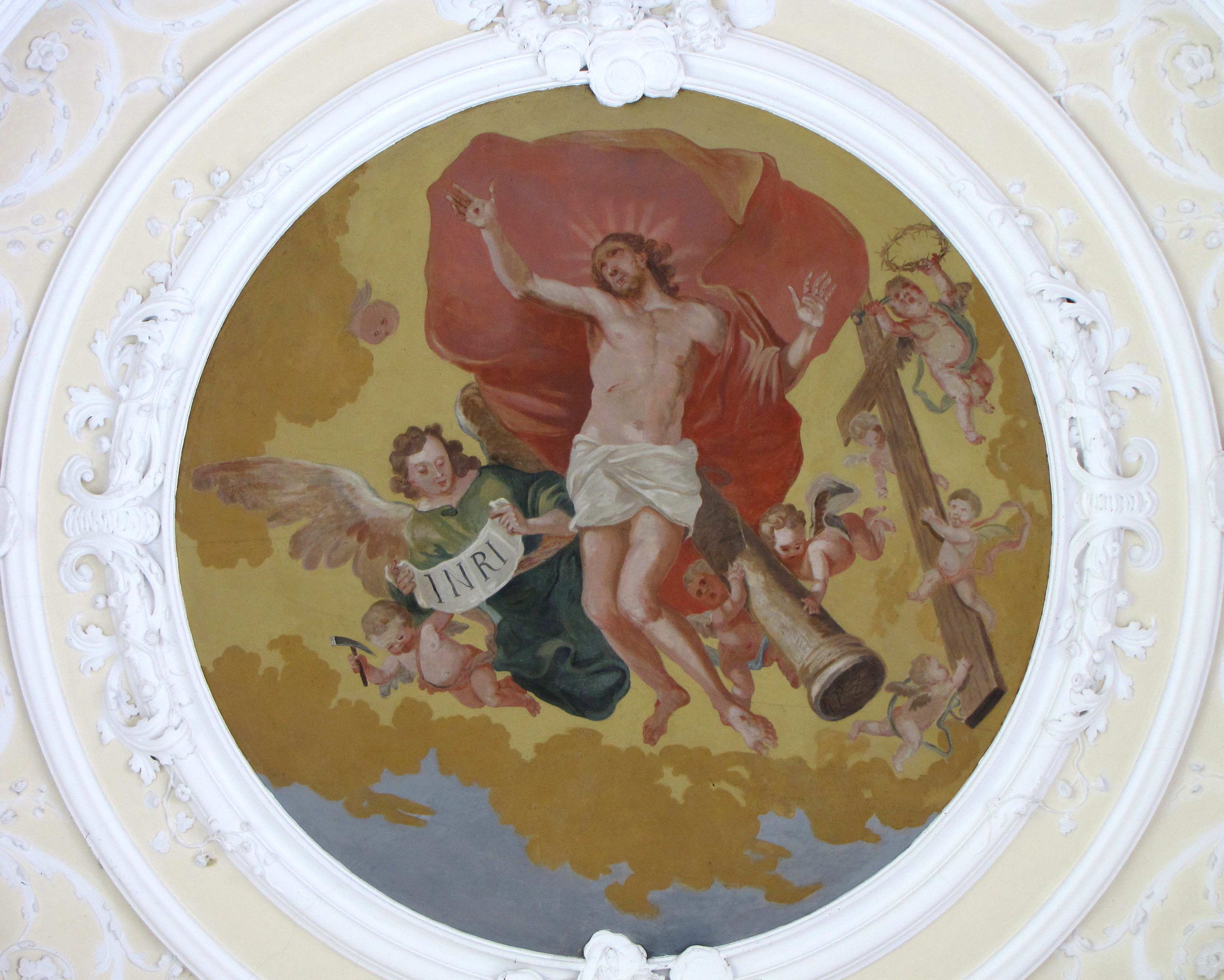 Chorbild